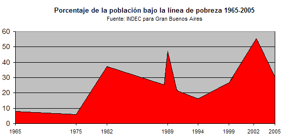 Pobreza. Porcentaje de la población del Gran Buenos Aires bajo la línea de pobreza 1965-2005. Argentina. Poverty rate 1965-2005. Graphic